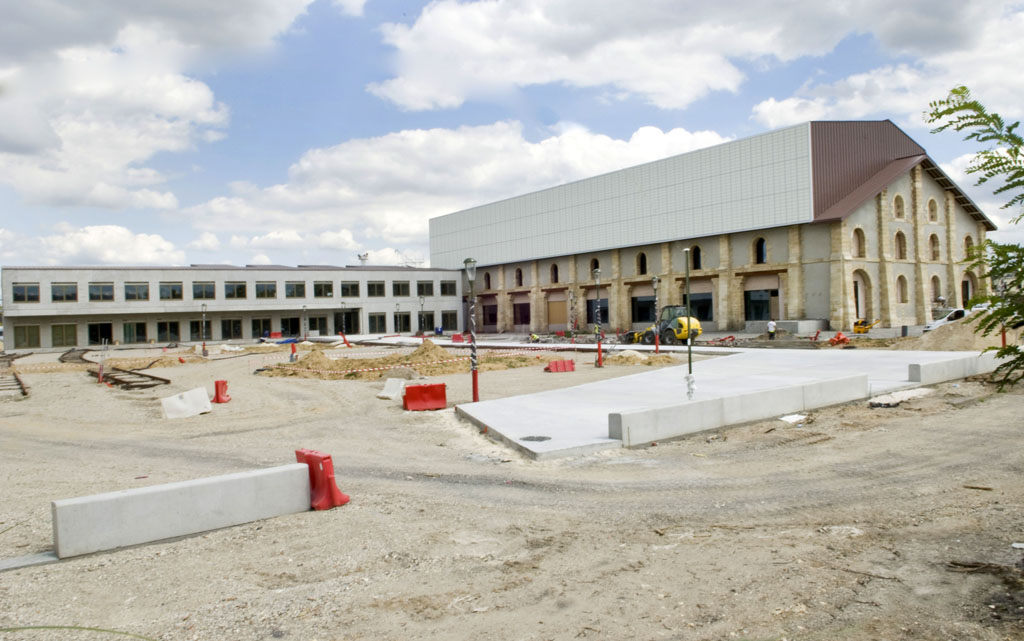 Les Nouvelles Archives en cours de construction autour du parvis des Archives, architectes Robbrecht & Daem, 2014 FRAC033063_REP_2014_08_21_001